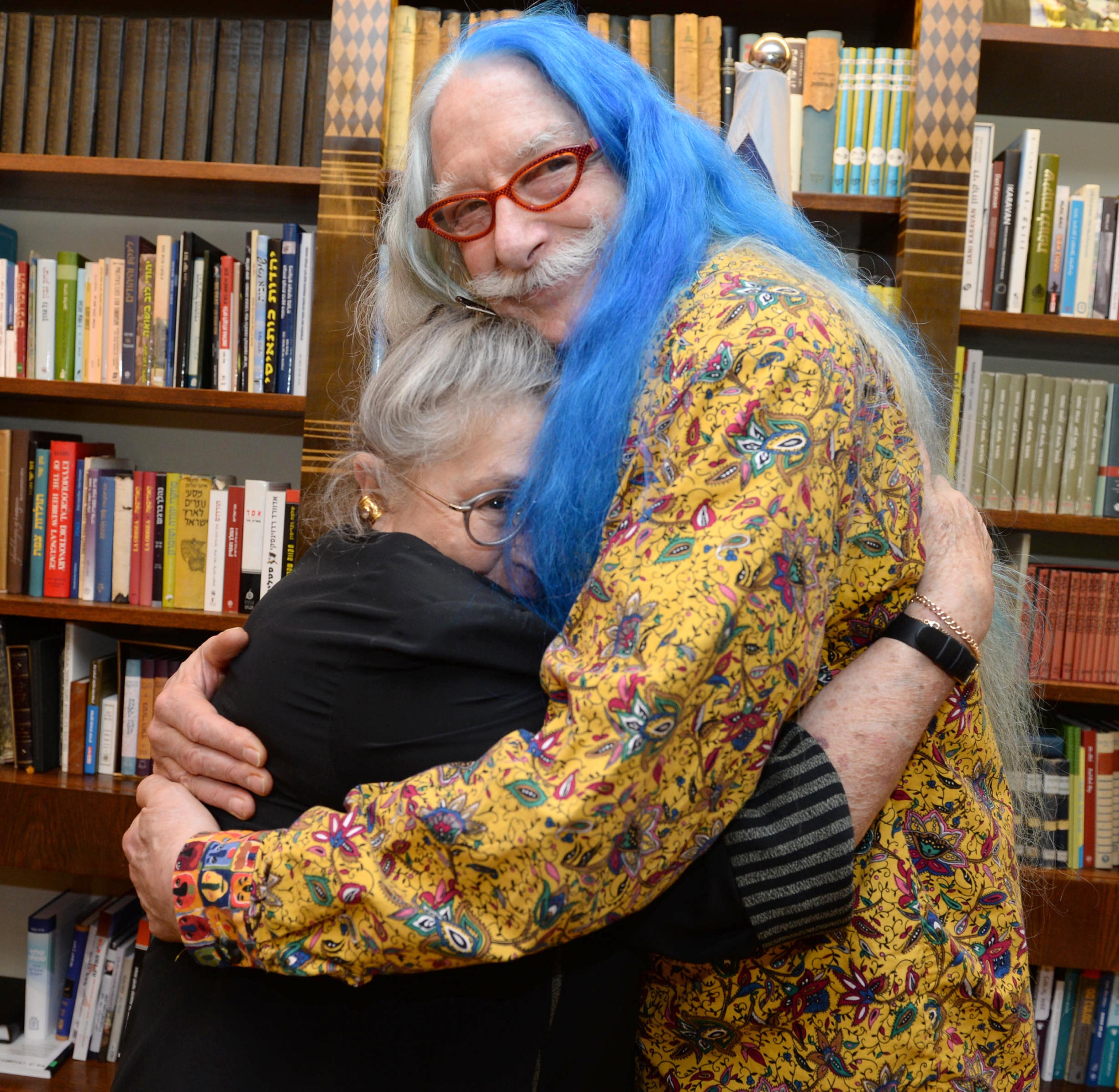 נשיא מדינת ישראל ראובן ריבלין בטקס הענקת "פרס דניאלי לרפואה עם לב" לרופאות, רופאים ואחיות מתחום האונקולוגיה כהוקרה על טיפול יוצא דופן בחולים בתמונה האנטר פאץ' אדאמס עם נחמה ריבלין